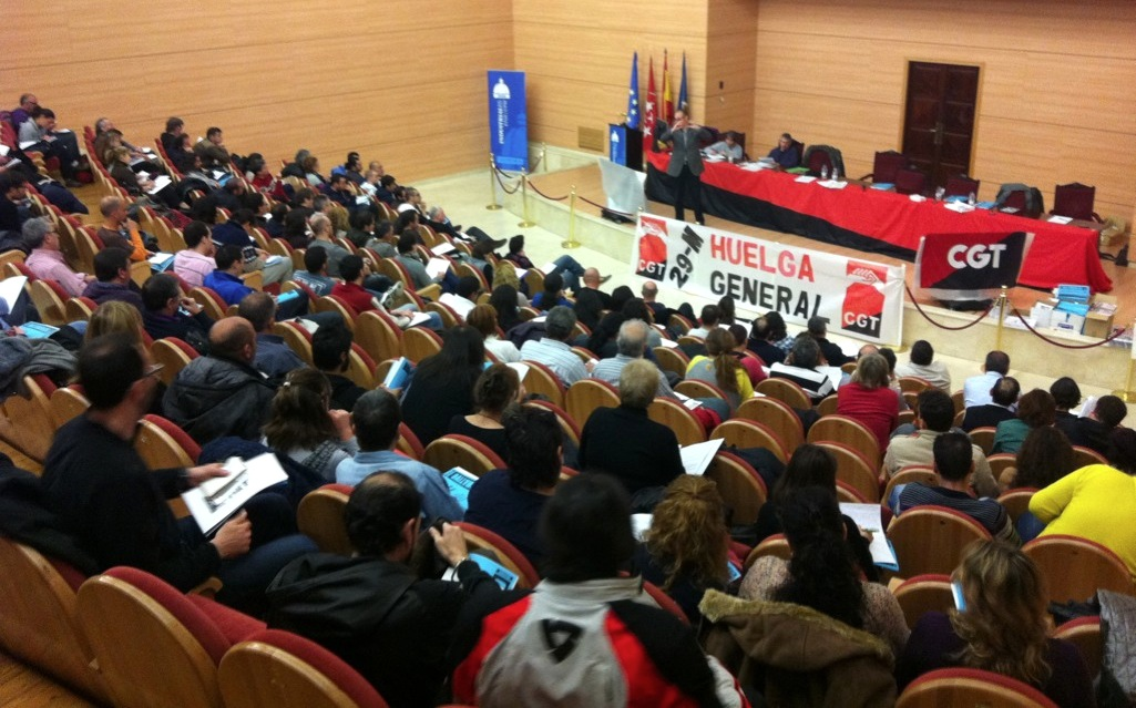 ASAMBLEA CGT